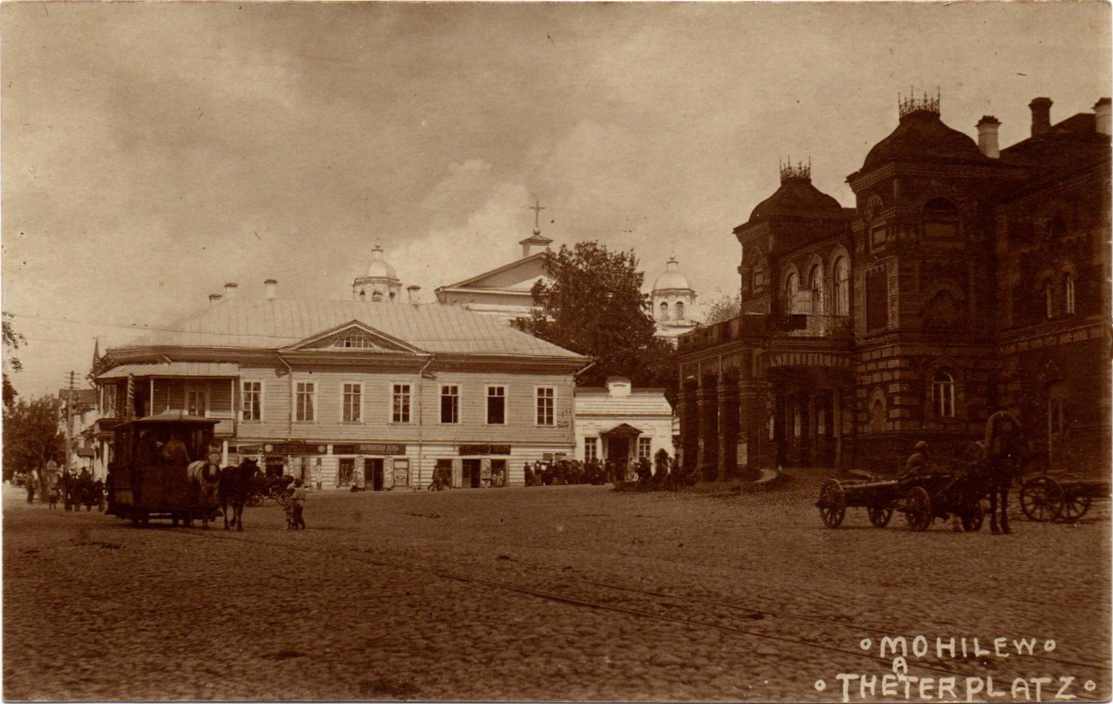 Беларуская (тарашкевіца): Магілёў (Mahiloŭ), пляц Тэатральны (plac Teatralny)